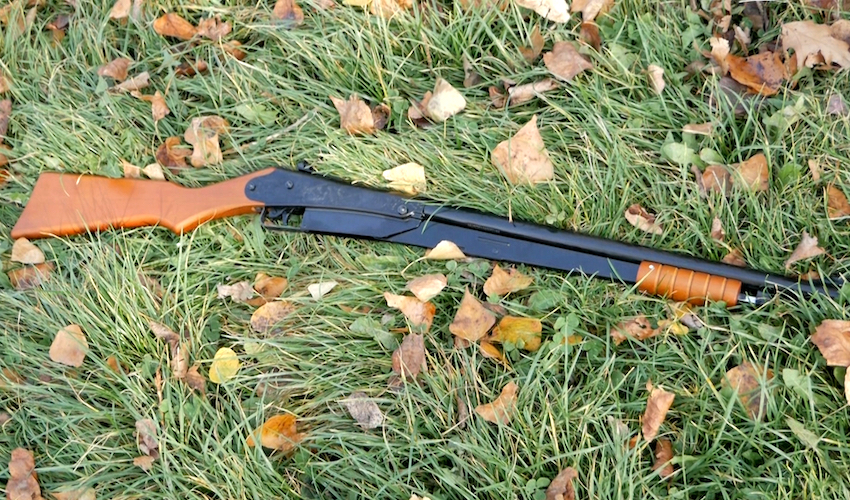 Vzduchovka Daisy Model 25 Pump Gun